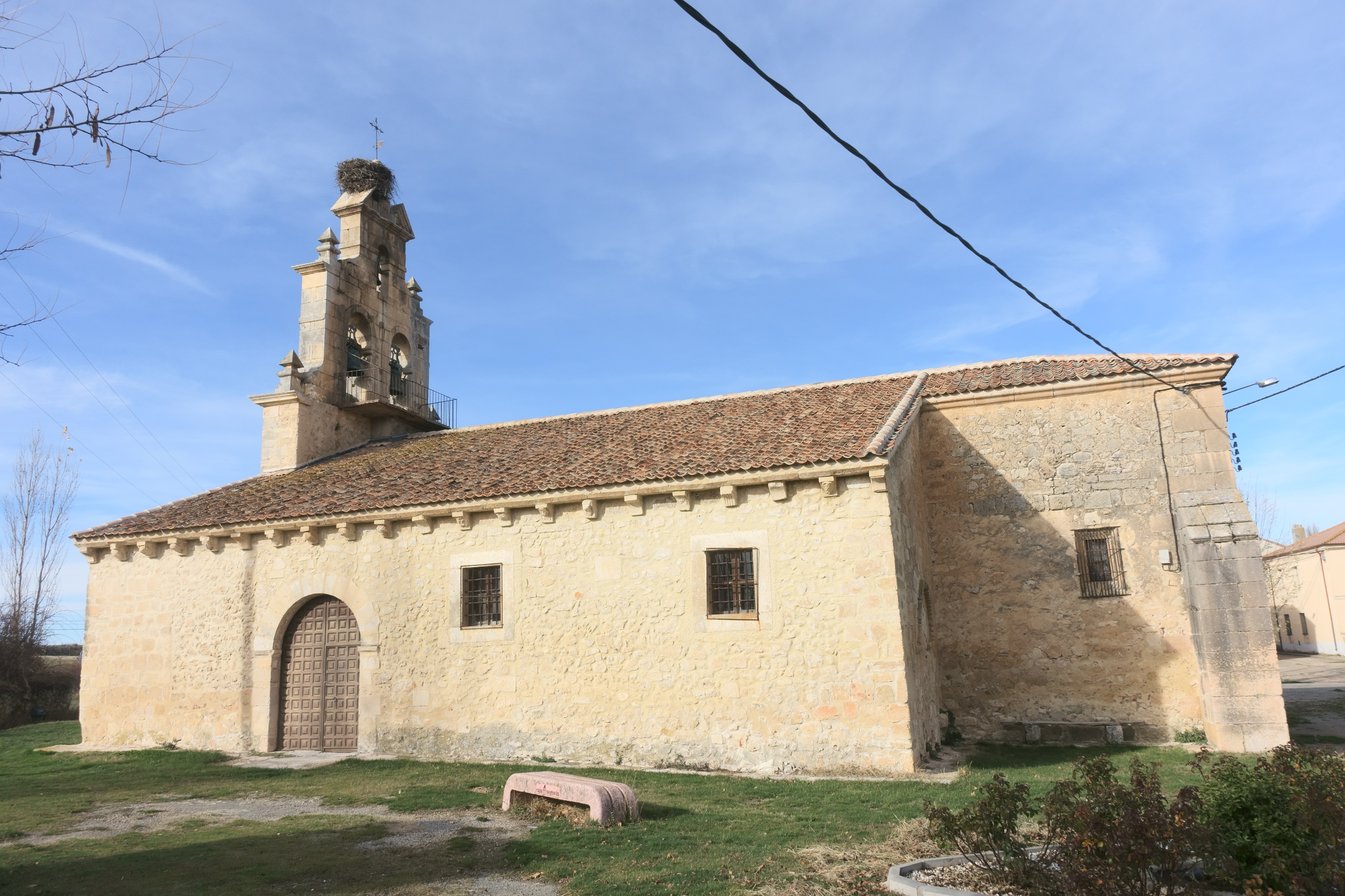 Iglesia de Santo Tomás, Bercimuel (Segovia, España).